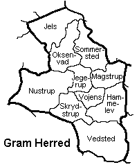 Als Nørre Herred, Sønderborg Amt, Danmark.